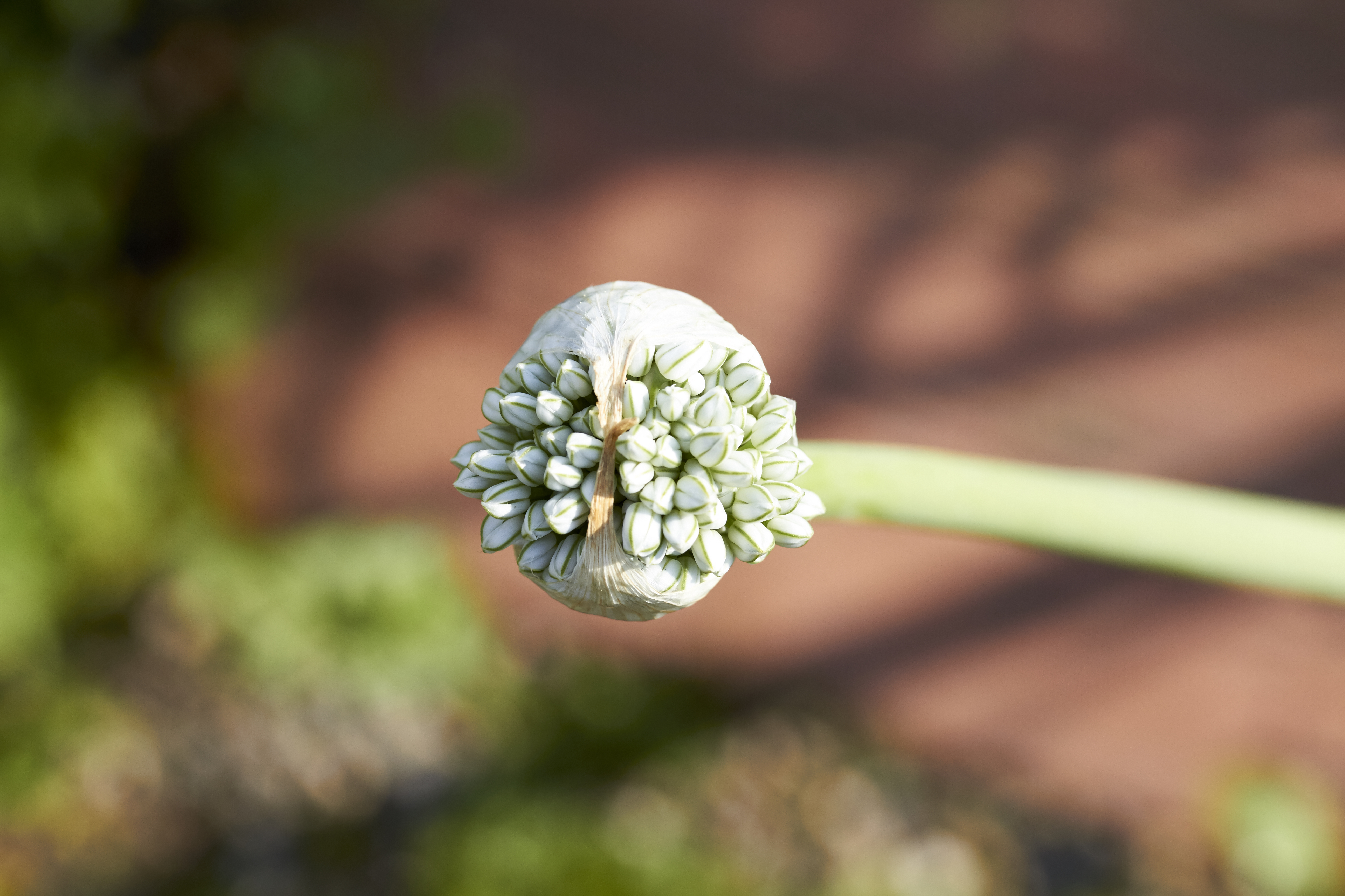 Zwiebelblüte, teilweise geöffnet (Allium cepa)